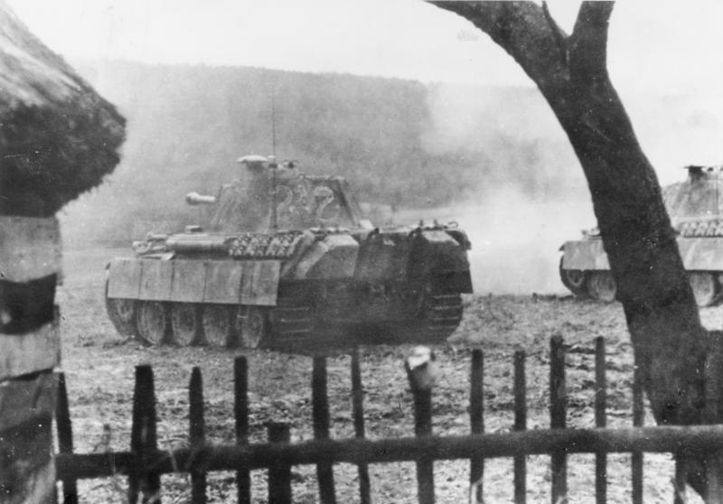 I:TO "Panther" beschießen Feindziele. Vorgeschobene "Panther" beschießen sowjetische Feindziele am Hang eines Bergrückens, wo sie sich einzunisten versuchen. Foto: PK - Kriegsber. Valtingojer/TO-EP 12.12.1944